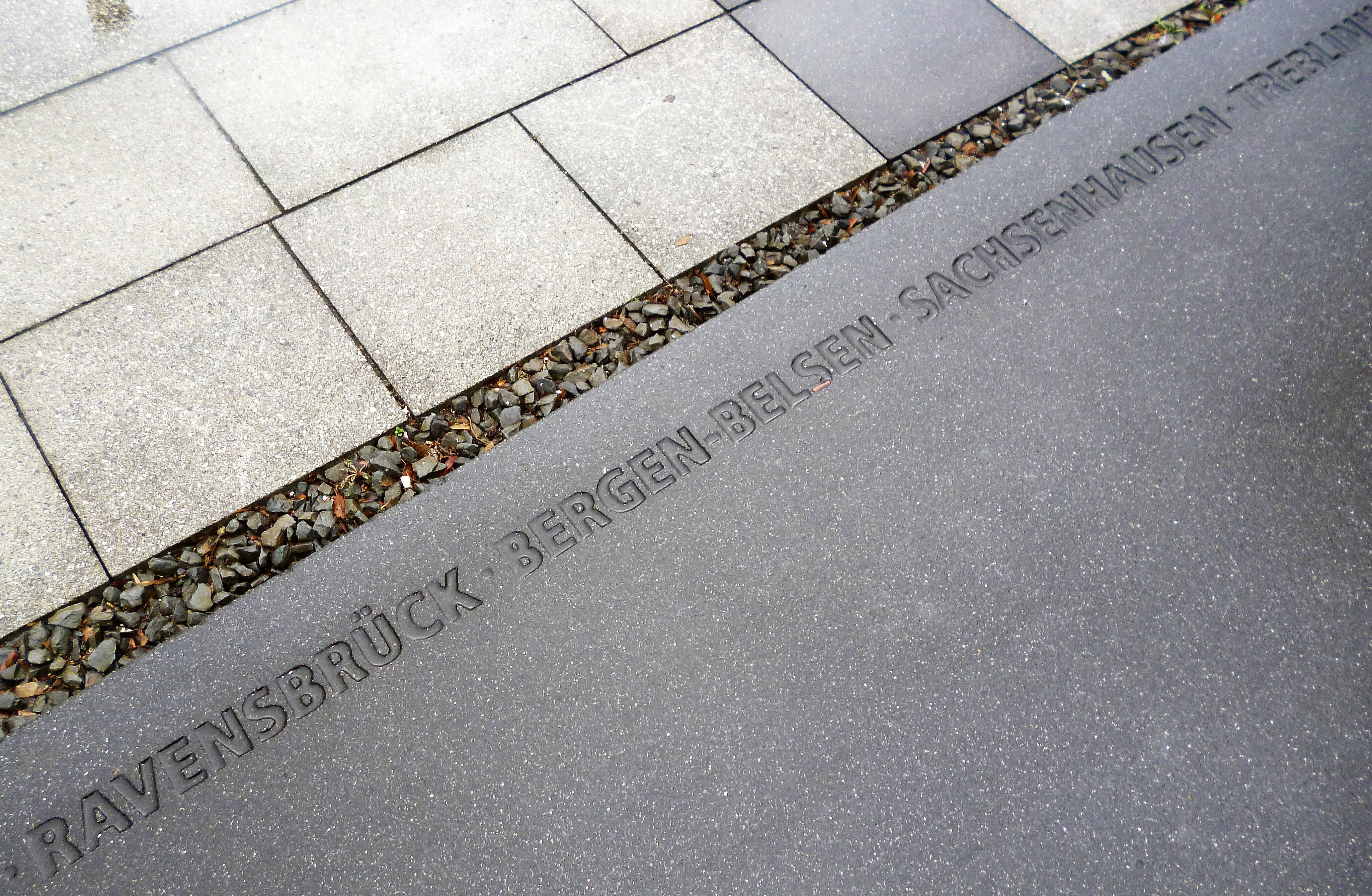 Shoa Mahnmal Herne, Januar 2019: eine dunkle anthrazitfarbene begehbare rampenähnlich aufsteigende Betonplatte führt zu einer aufrecht stehenden Gedenktafel. Am Anfang der fünf Meter langen Rampe, die auf die Selektionsrampen in den Konzentrationslagern verweist, ist auf hebräisch und deutsch „Gedenke 1933-1945“ eingelassen, an den Längsseiten die Namen von Ghettos und verschiedenen Arbeits-, Konzentrations-, Internierungs- und Vernichtungslagern, in die die Herner und Wanne-Eickeler deportiert oder in denen sie ermordet wurden.